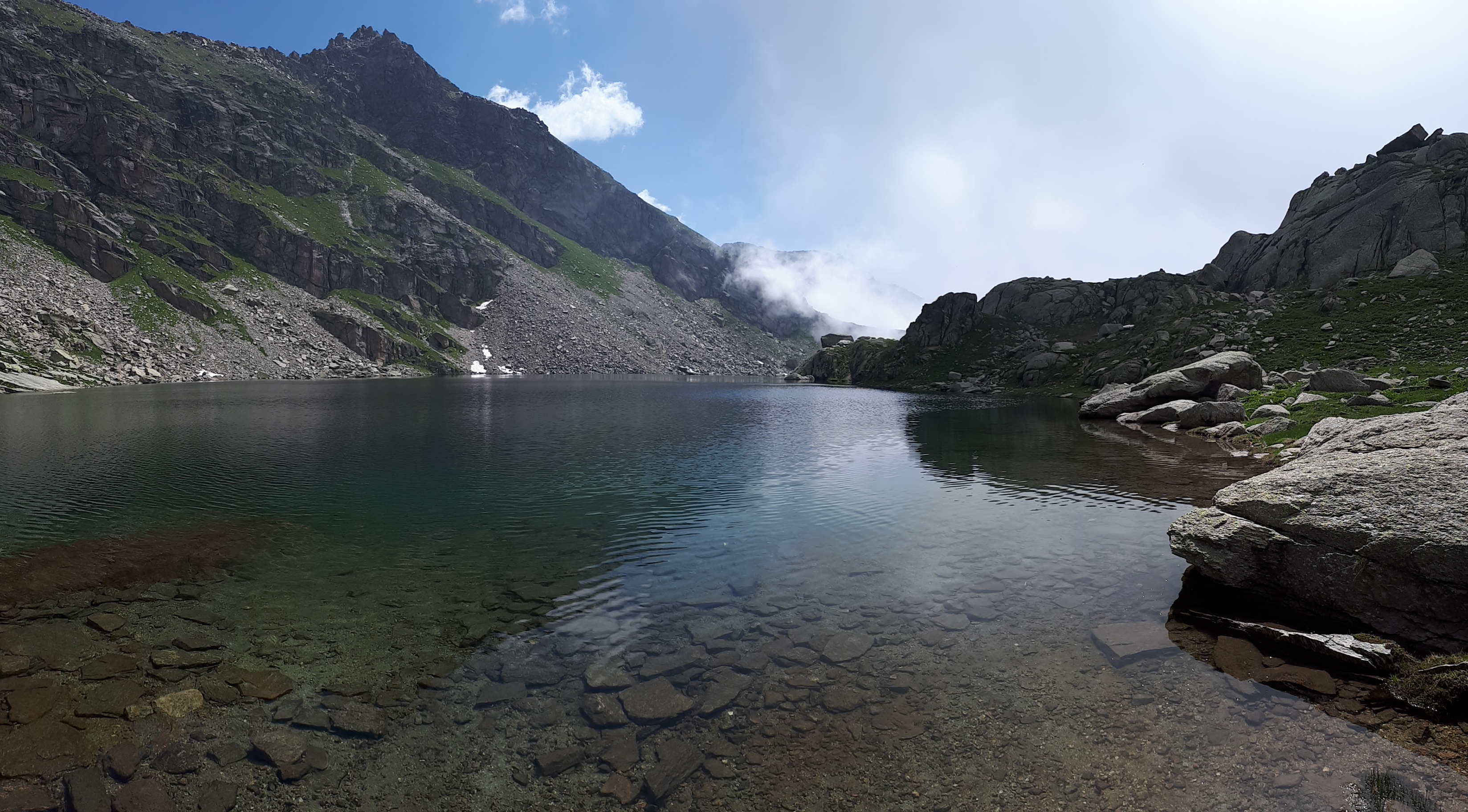 Il Lago Grande di Unghiasse collocato nella val Grande di Lanzo